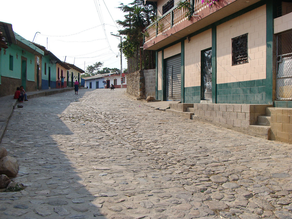 Una de las calles principales de San Ignacio en Chalatenango. El Salvador